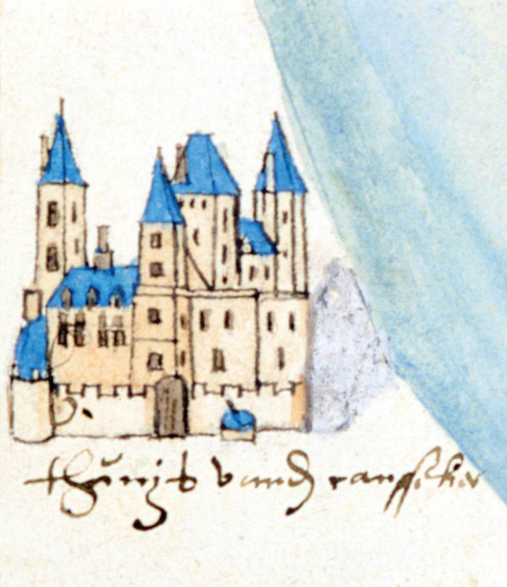 L’ancien hôtel des ducs de Brabant en 1589 (Archives Générales du Royaume, Cartes et plans manuscrits, n° 2997)